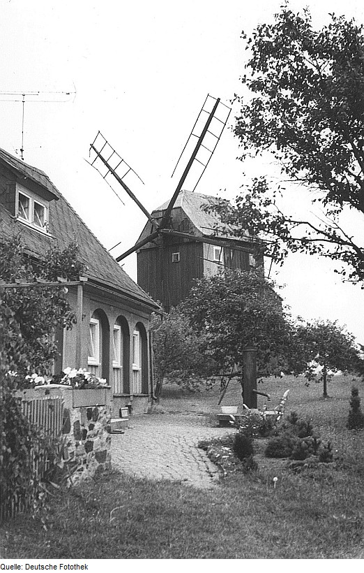 Original image description from the Deutsche Fotothek Eibau-Neueibau. Neumanns- oder Zimmermann-Mühle, Bockmühle und Wohnhaus